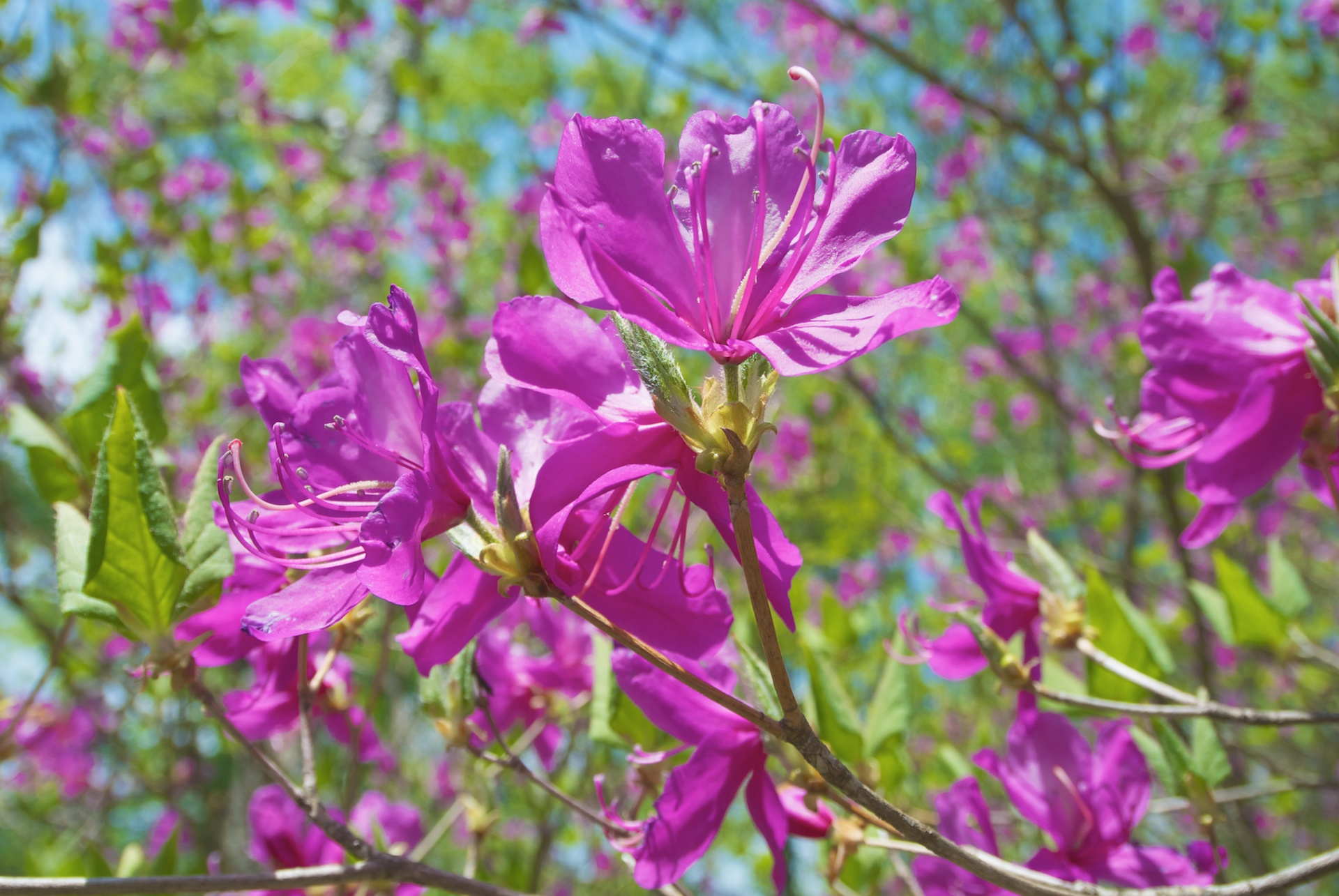 w/ Nikon 1 V1 +6.7-11mm